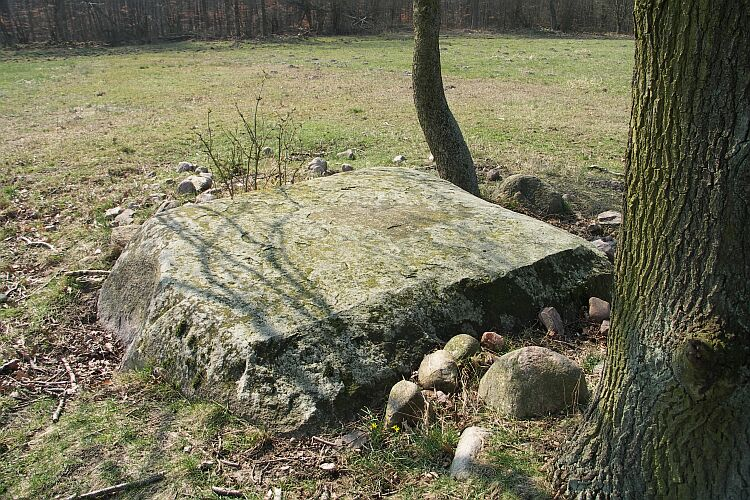 sacrifice stone (?) Stadtstelle, Germany